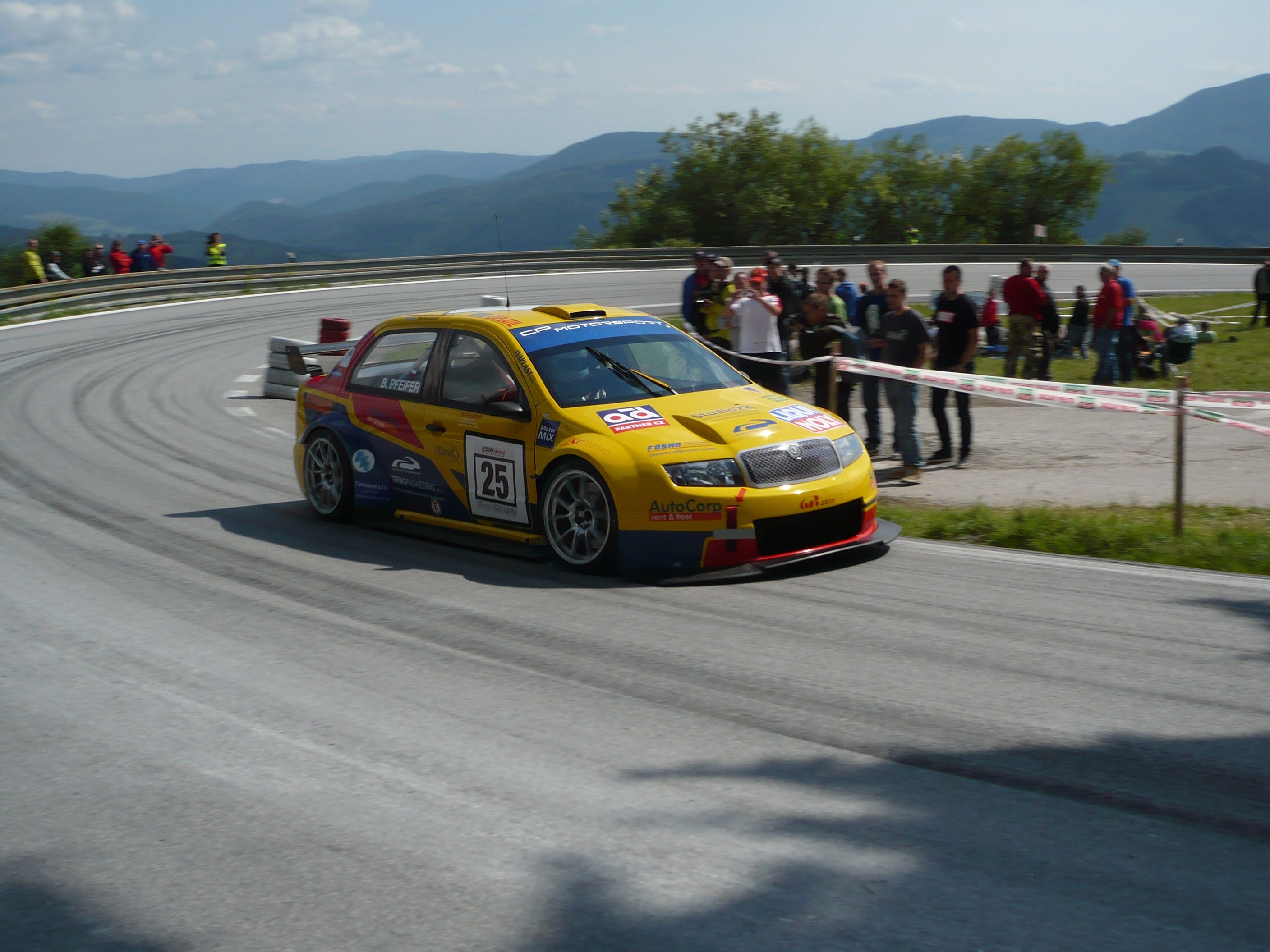 Škoda Fabia Sedan EVO Bohumila Pfeifera na ME PAV Dobšinský kopec 2012